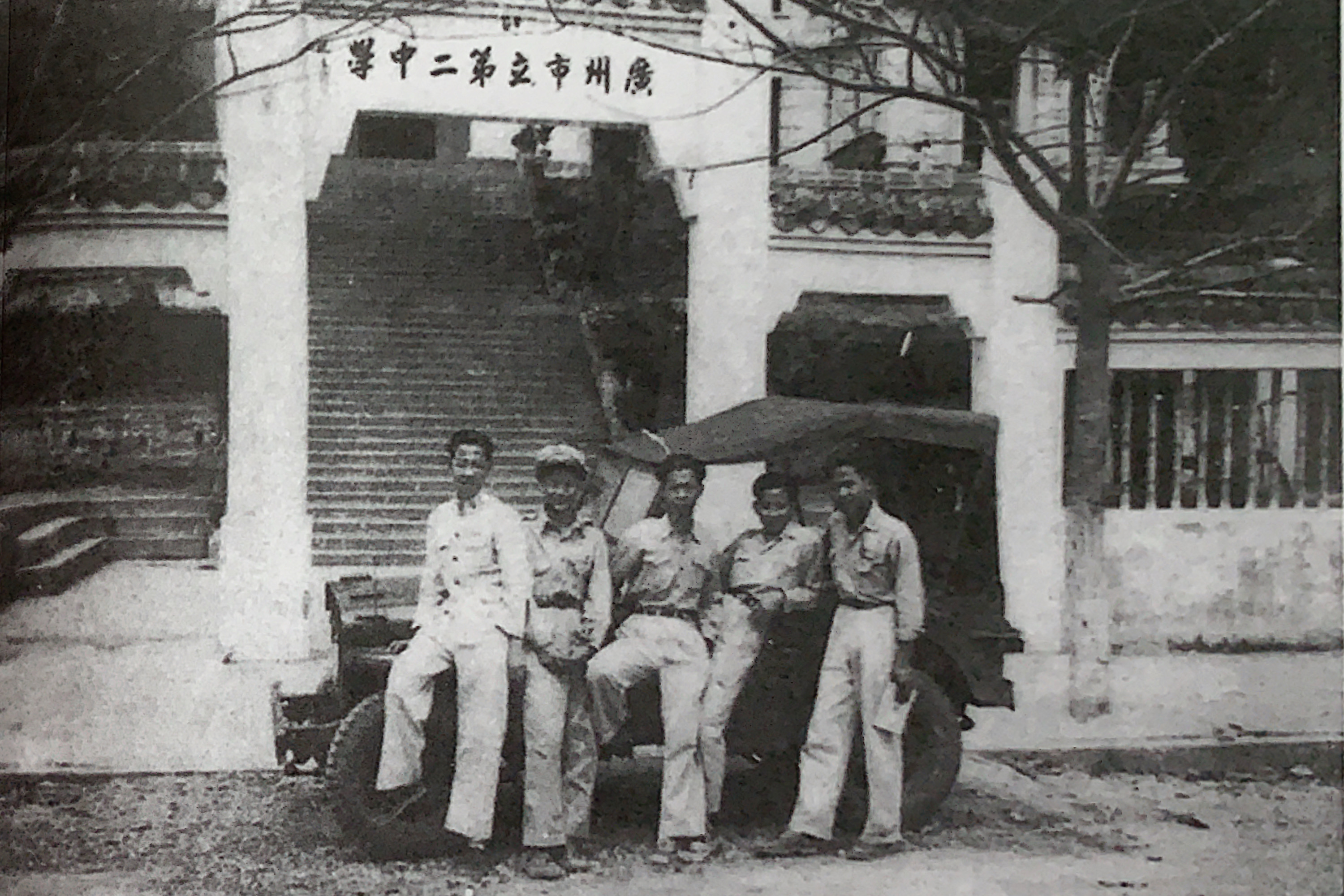 20世纪40年代的广州市立第二中学大门